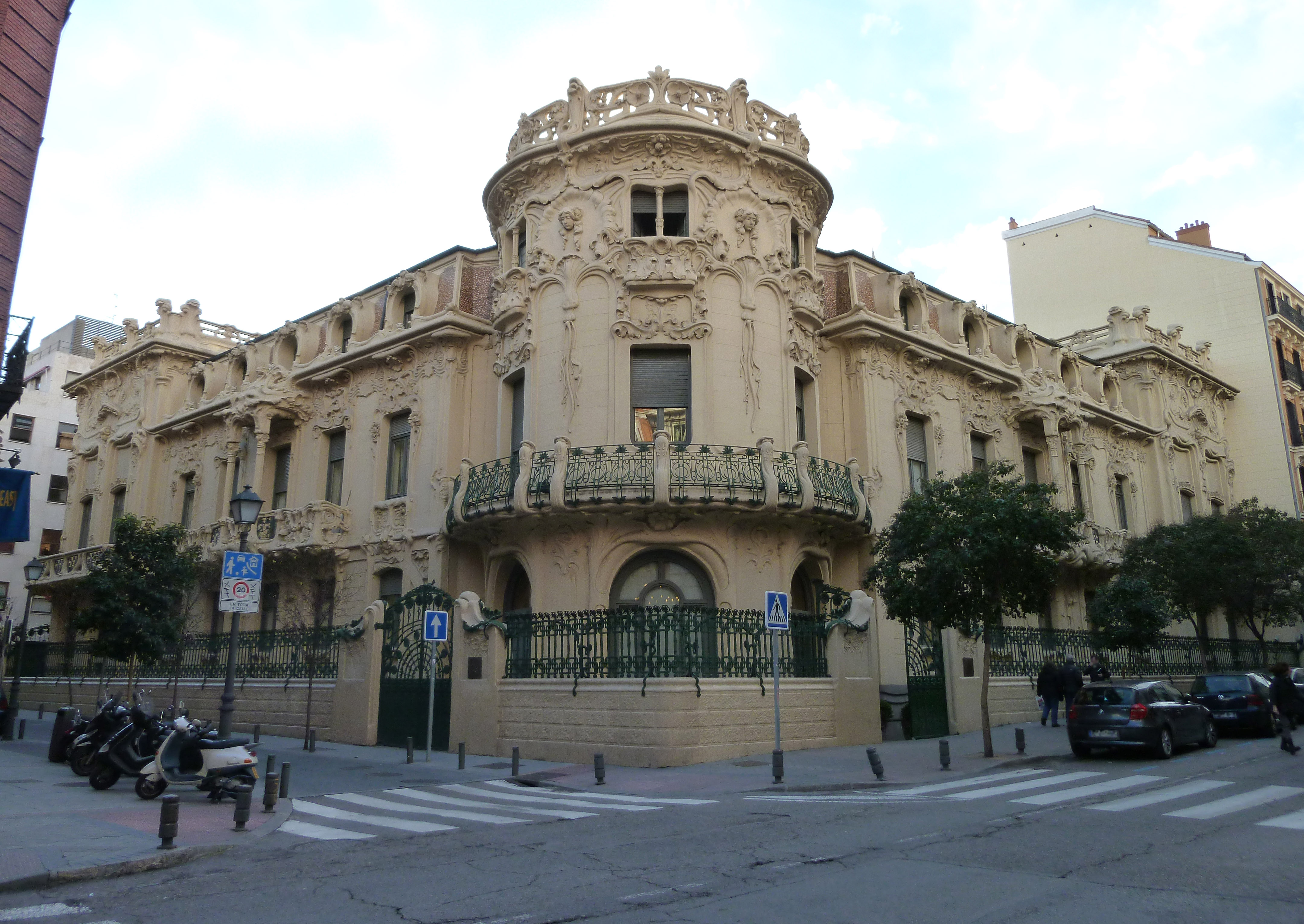 Palacio Longoria in Madrid (Spain).